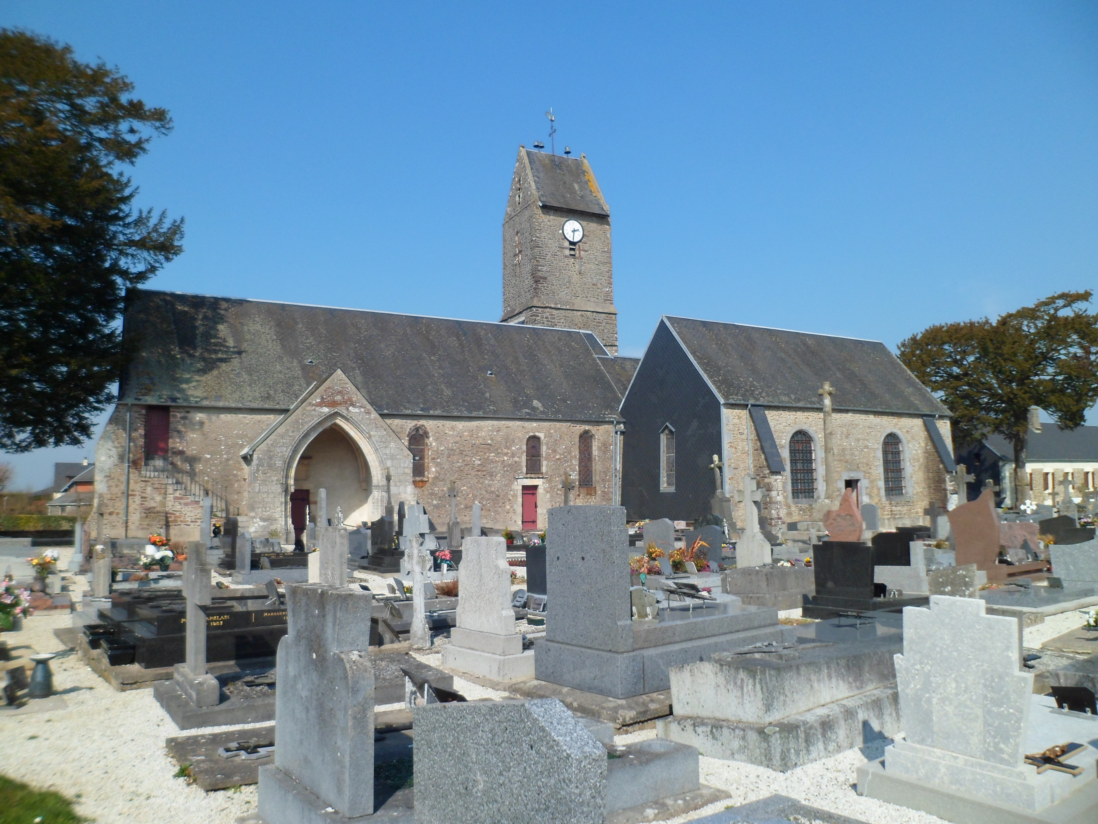 Église Saint-Martin de Dangy